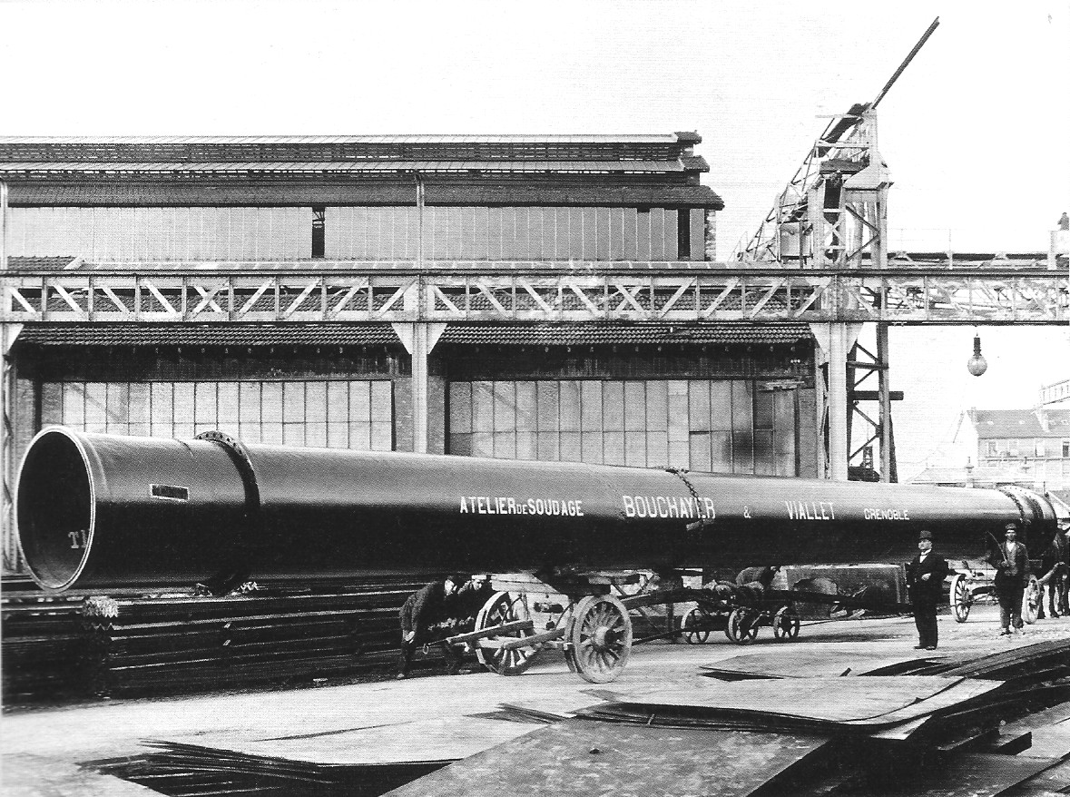 Conduite forcée fabriquée par les Ateliers Bouchayer et Viallet sur les bords du Drac à Grenoble (France). ADI fonds Bouchayer-Viallet